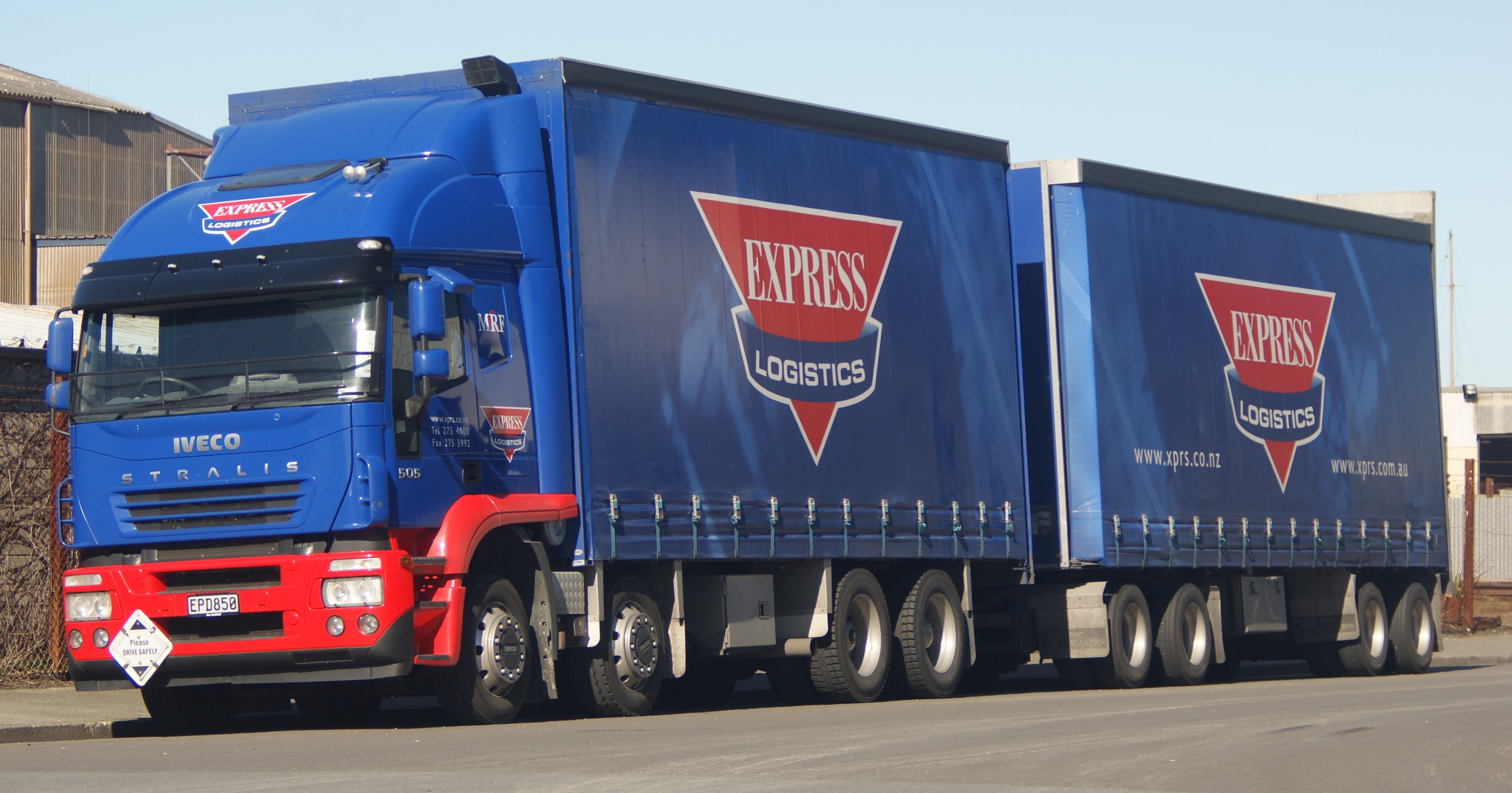 2008 Iveco Stralis